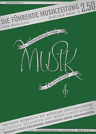 Österreichische MUSIKZEITschrift (Cover)